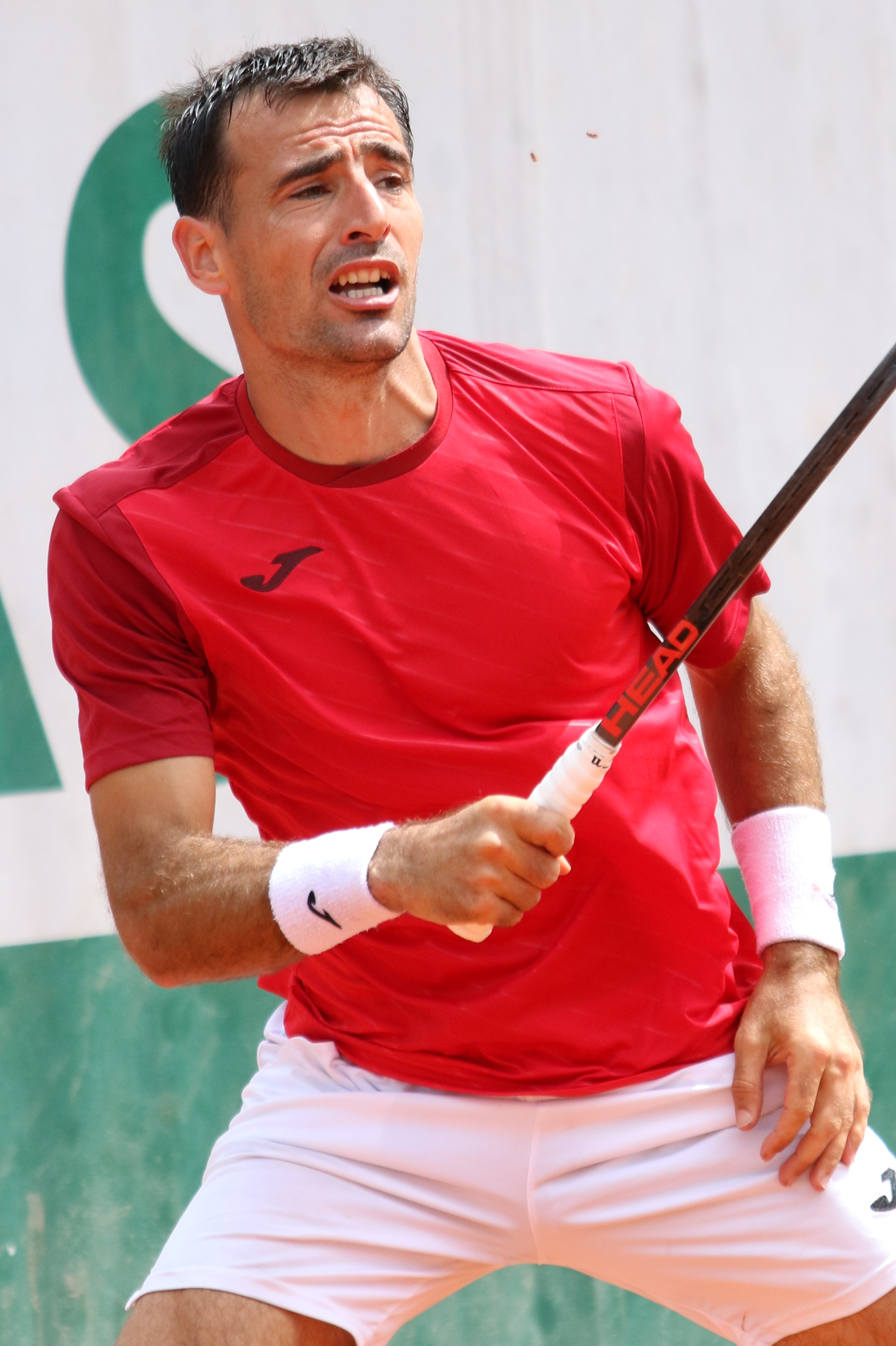 Dodig RG18 (10)